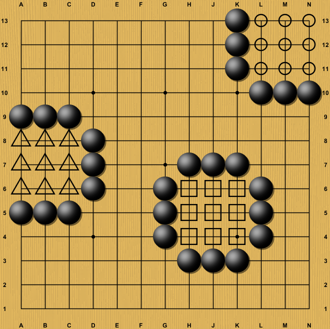 Territorios en el go